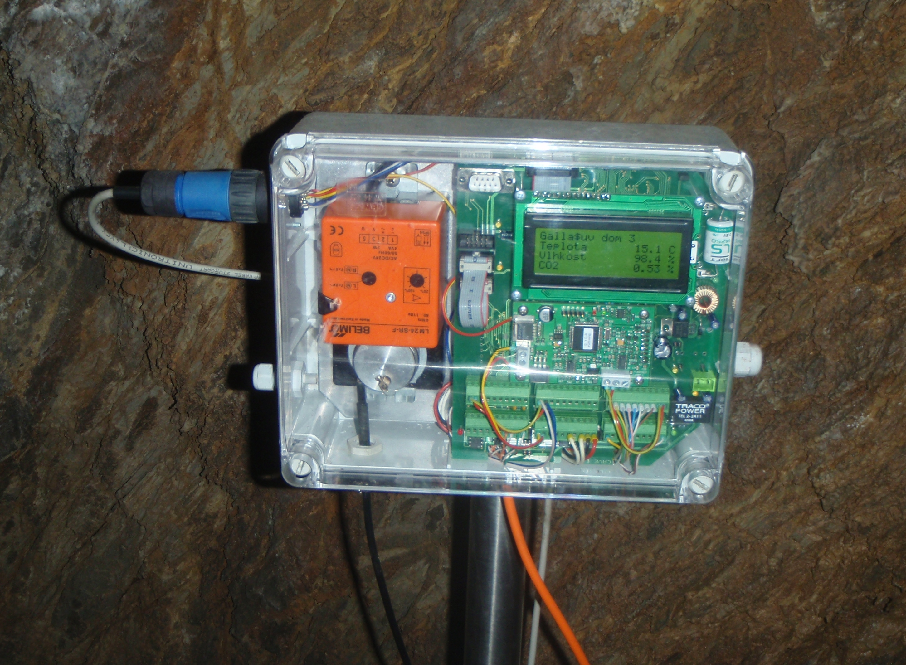 Měřící zařízení ve Zbrašovských aragonitových jeskyních